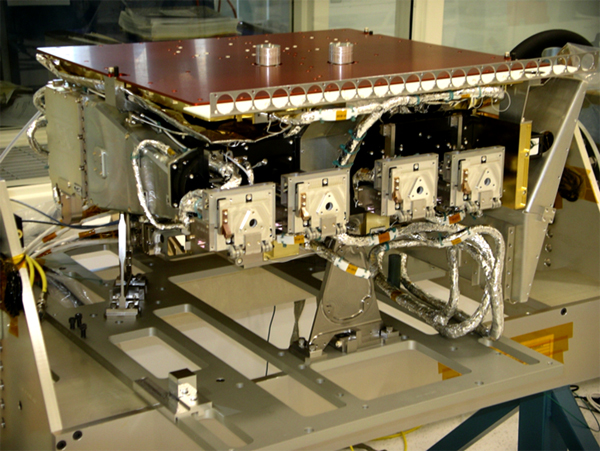 Solar Dynamics Observatory, EUV Variability Experiment instrument